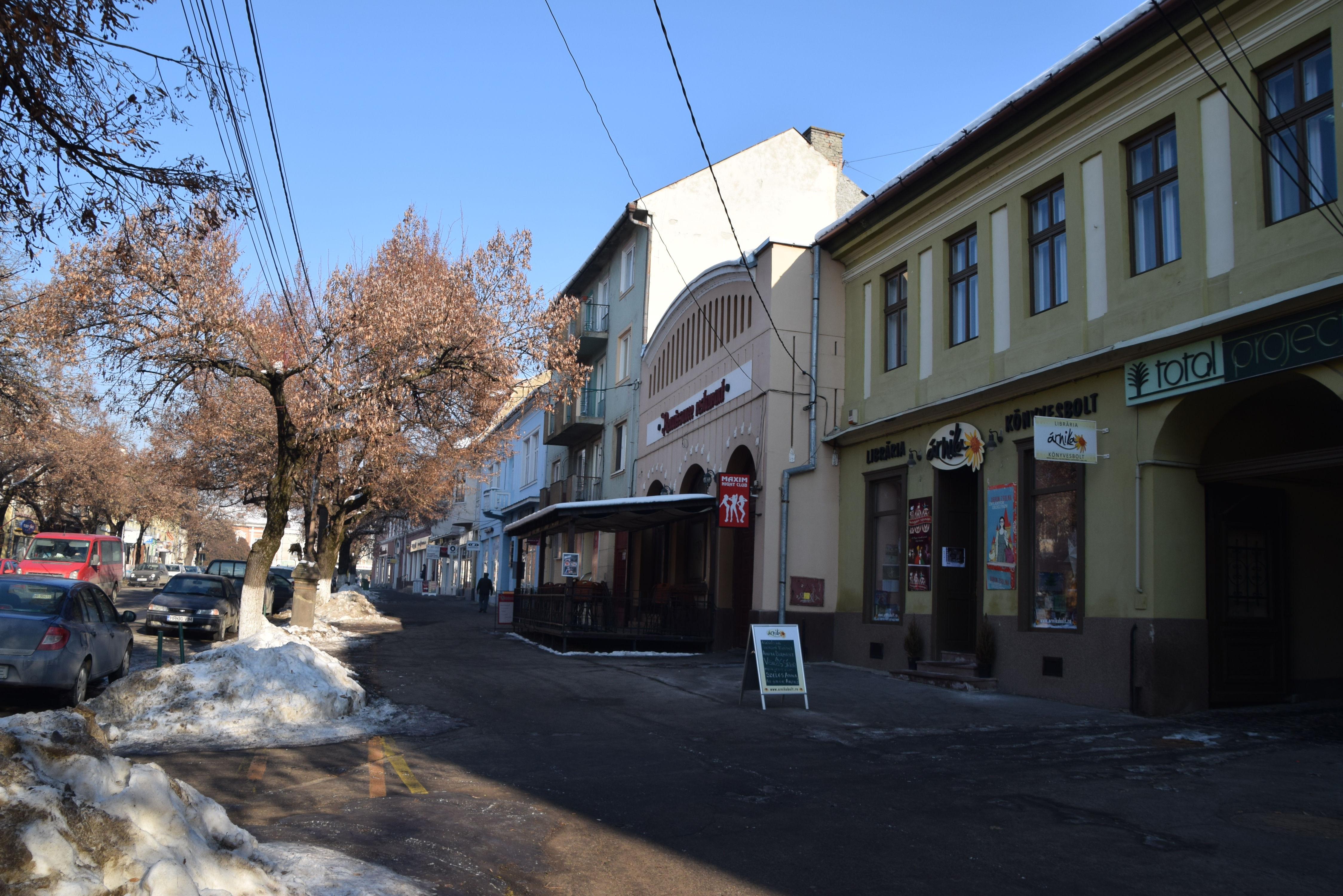 Clădirea primei tipografii, azi unitate comercială